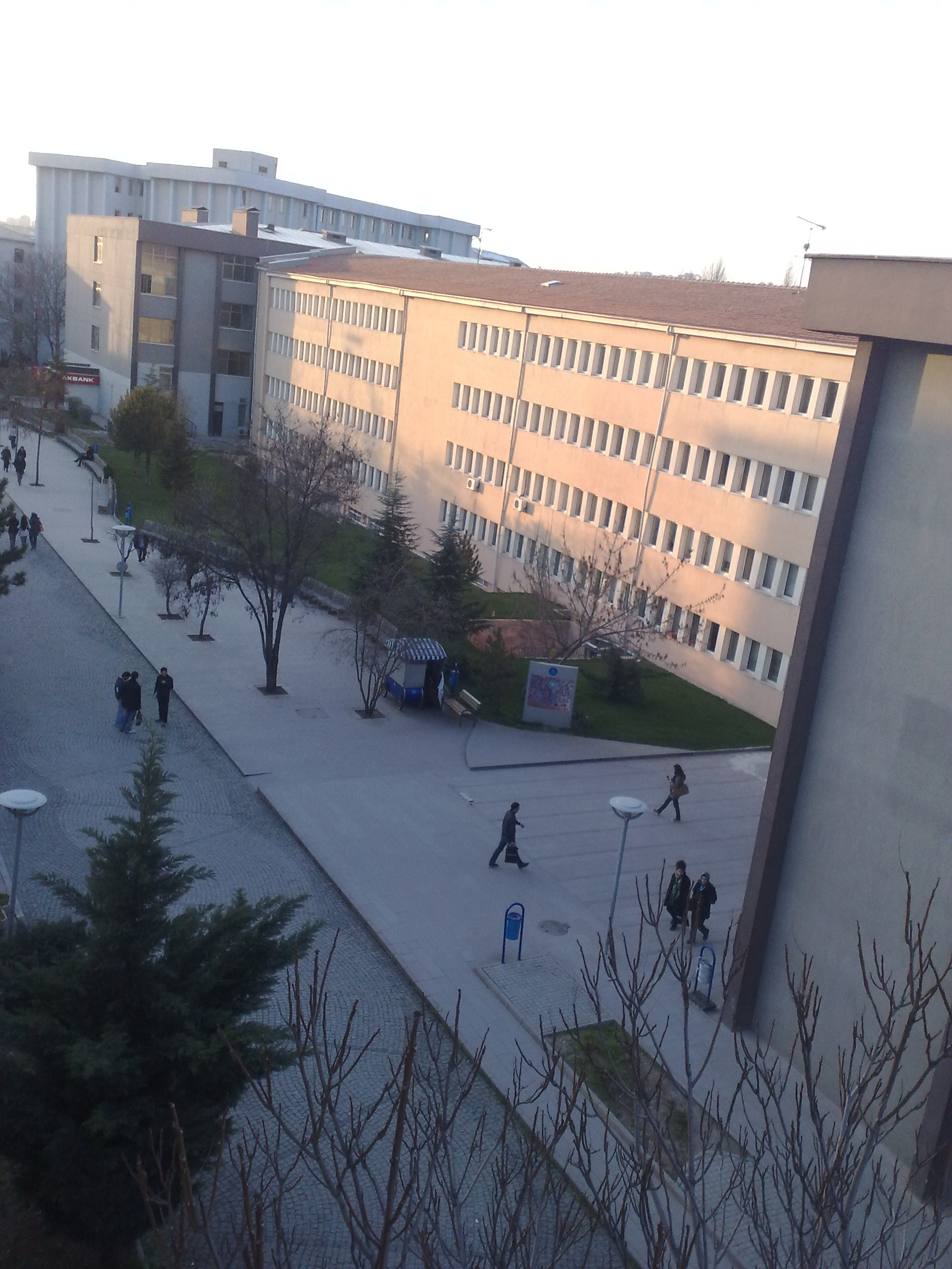 Gazi Üniversitesi'nden bir görüntü.